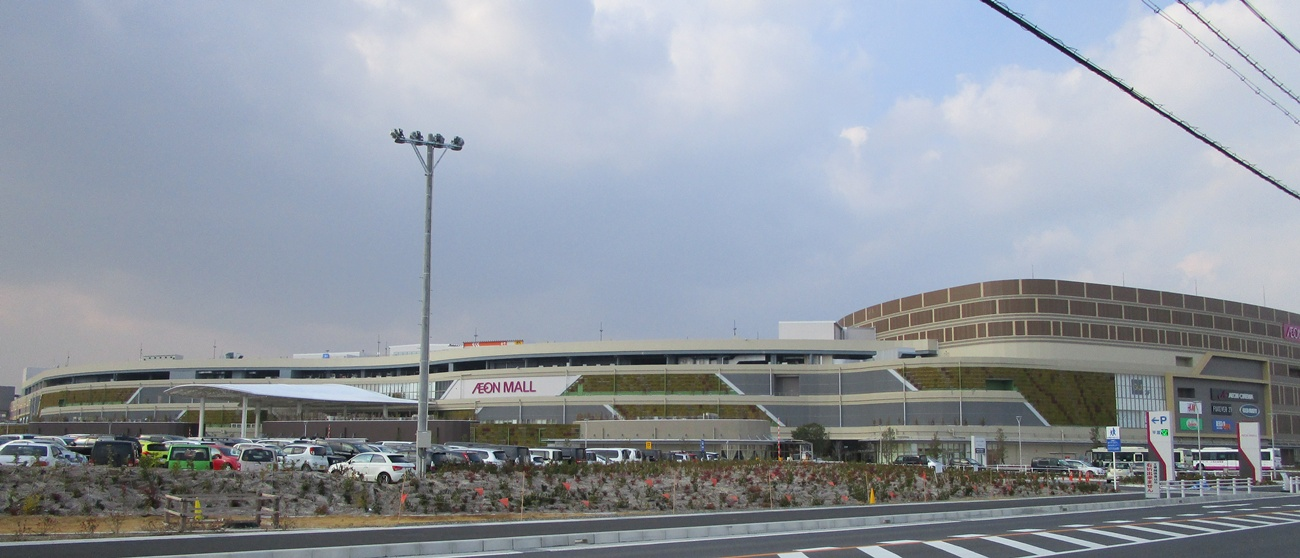 イオンモール名古屋茶屋（名古屋市港区）